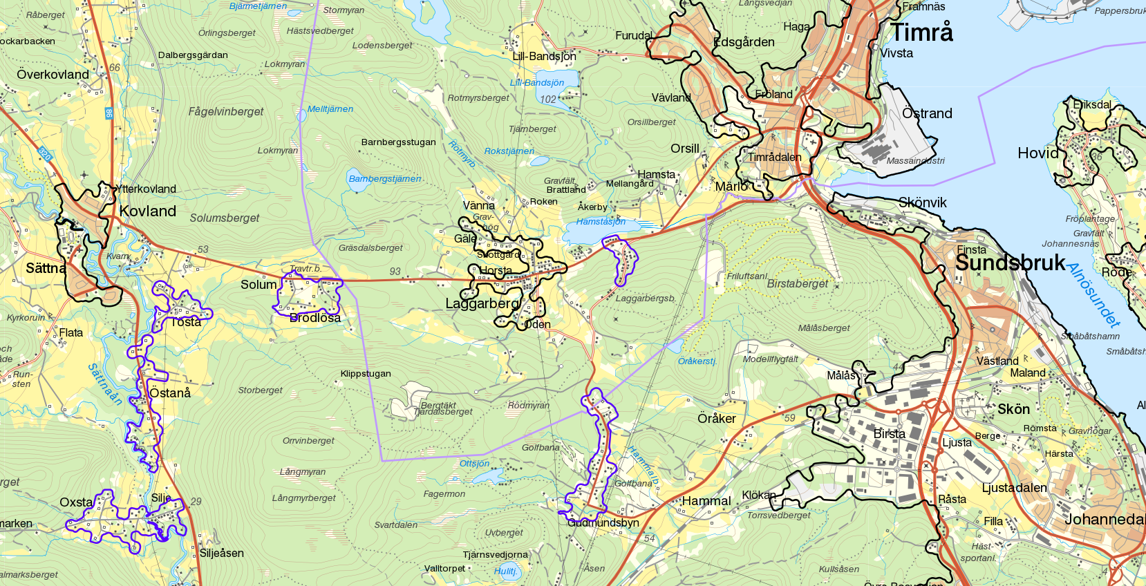 Tätorten Laggarberg med gränserna från Statistiska centralbyråns tätortsavgränsning 2015 i svart tillsammans med småorten i Laggarberg från SCB:s småortsavgränsning 2015 i lila. Bakgrundskarta från Lantmäteriet, skala 1:30 236. På kartan syns även andra småorter och tätorter.